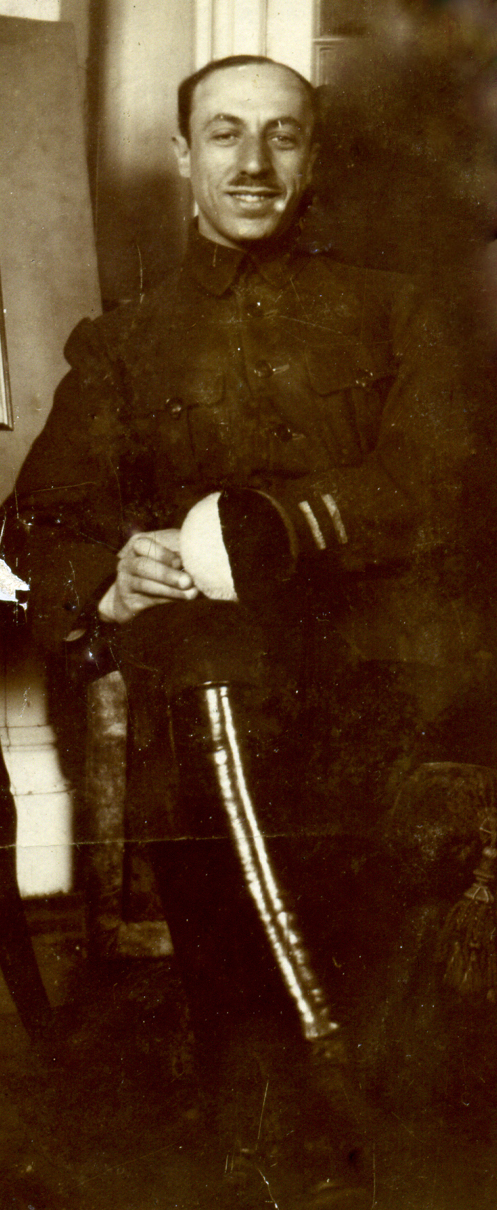 Горчаков Г.С.приехал в долгожданный отпуск с южного фронта